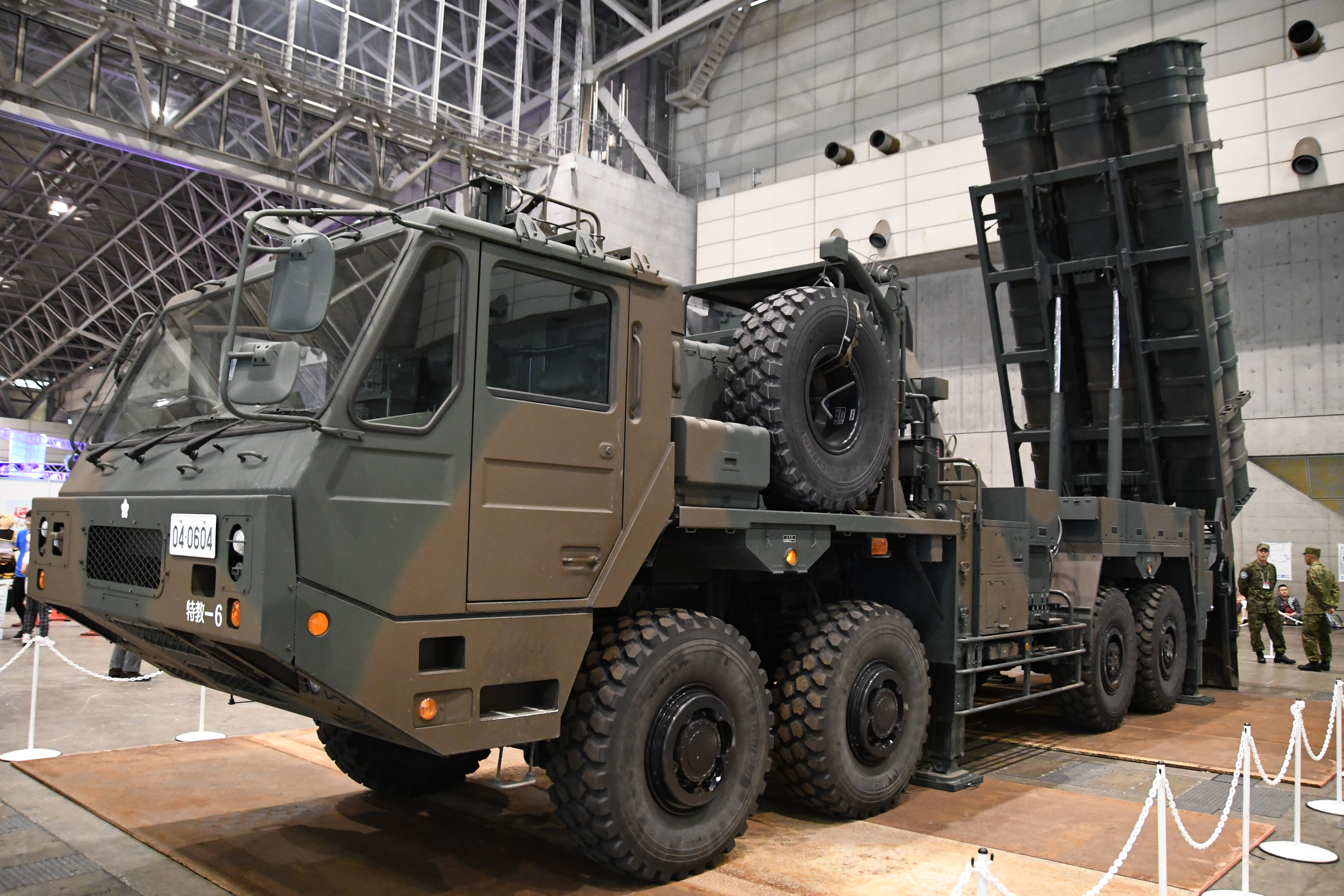 陸上自衛隊 12式地対艦誘導弾 発射装置（04-0604号車 発射形態） 左前面。2018年4月28日 幕張メッセにて開催された「ニコニコ超会議2018」自衛隊ブース内にて。